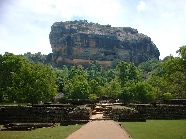 Sigiriya Rock Fortress (Volcanic plug), Sri Lanka.